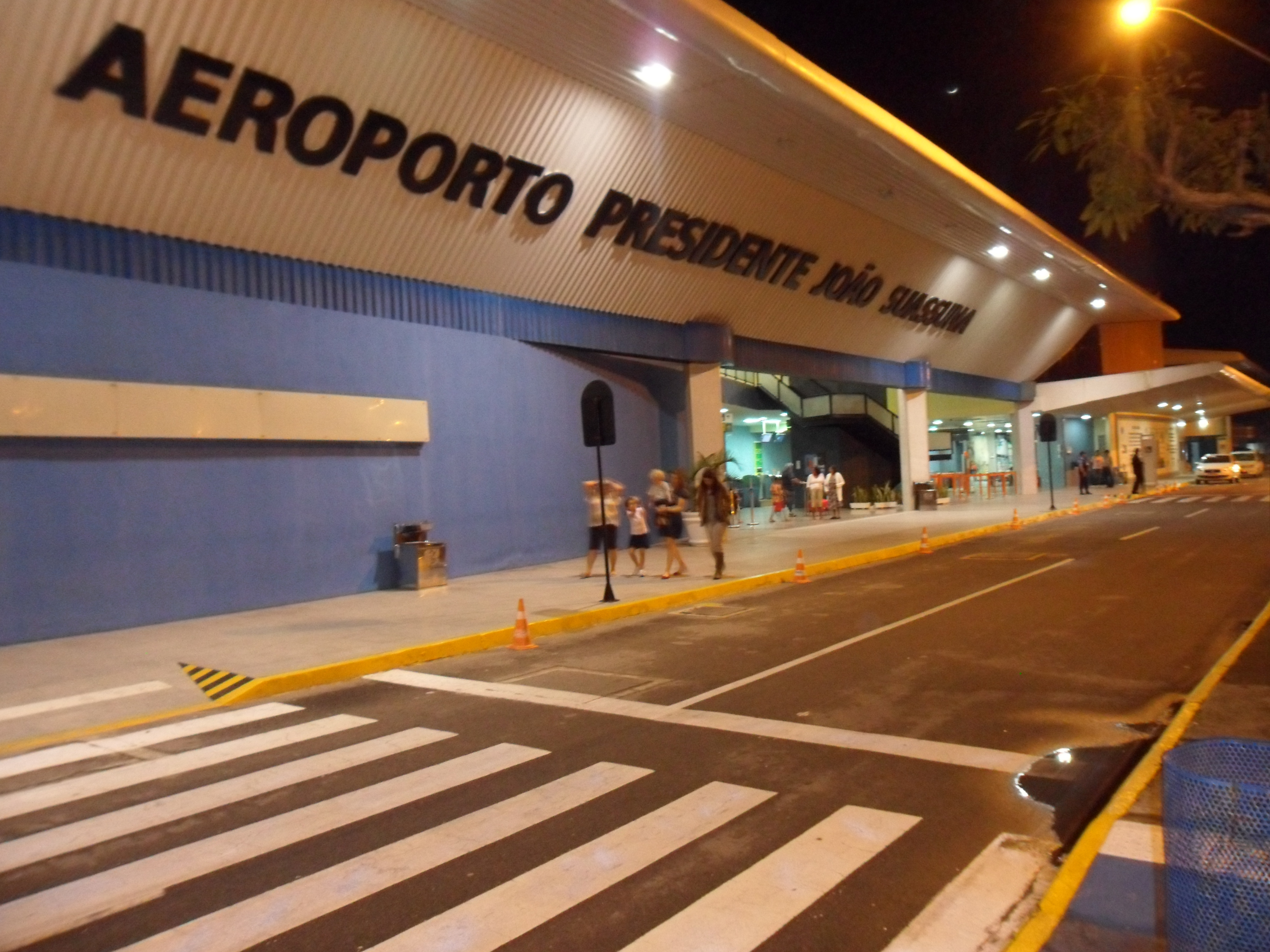 Aeroporto da cidade de Campina Grande - PB